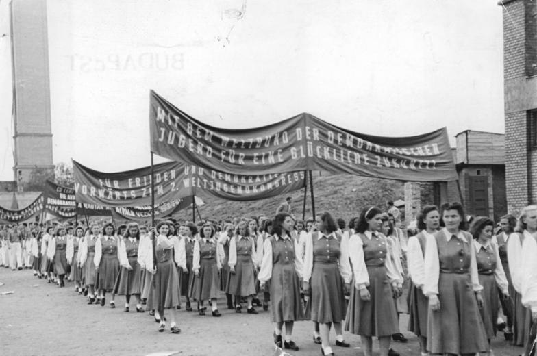 Budapest, II. Weltfestspiele, Festumzug, FDJ Weltjugendfestspiele in Budapest 1949-Vorbeimarsch der FDJ.Zentralbild-Ho- Information added by Wikimedia users. first bannerdeenMIT DEM WELTBUND DER DEMOKRATISCHEN JUGEND FÜR EINE GLÜCKLICHE ZUKUNFT!WITH THE WORLD FEDERATION OF DEMOCRATIC YOUTH FOR A HAPPY FUTURE! second bannerdeenFÜR FRIEDEN UND DEMOKRATIE VORWÄRTS ZUM 2. WELTJUGENDKONGRESSFOR PEACE AND DEMOCRACY FOREWARDS TO THE 2nd WORLD YOUTH CONGRESS